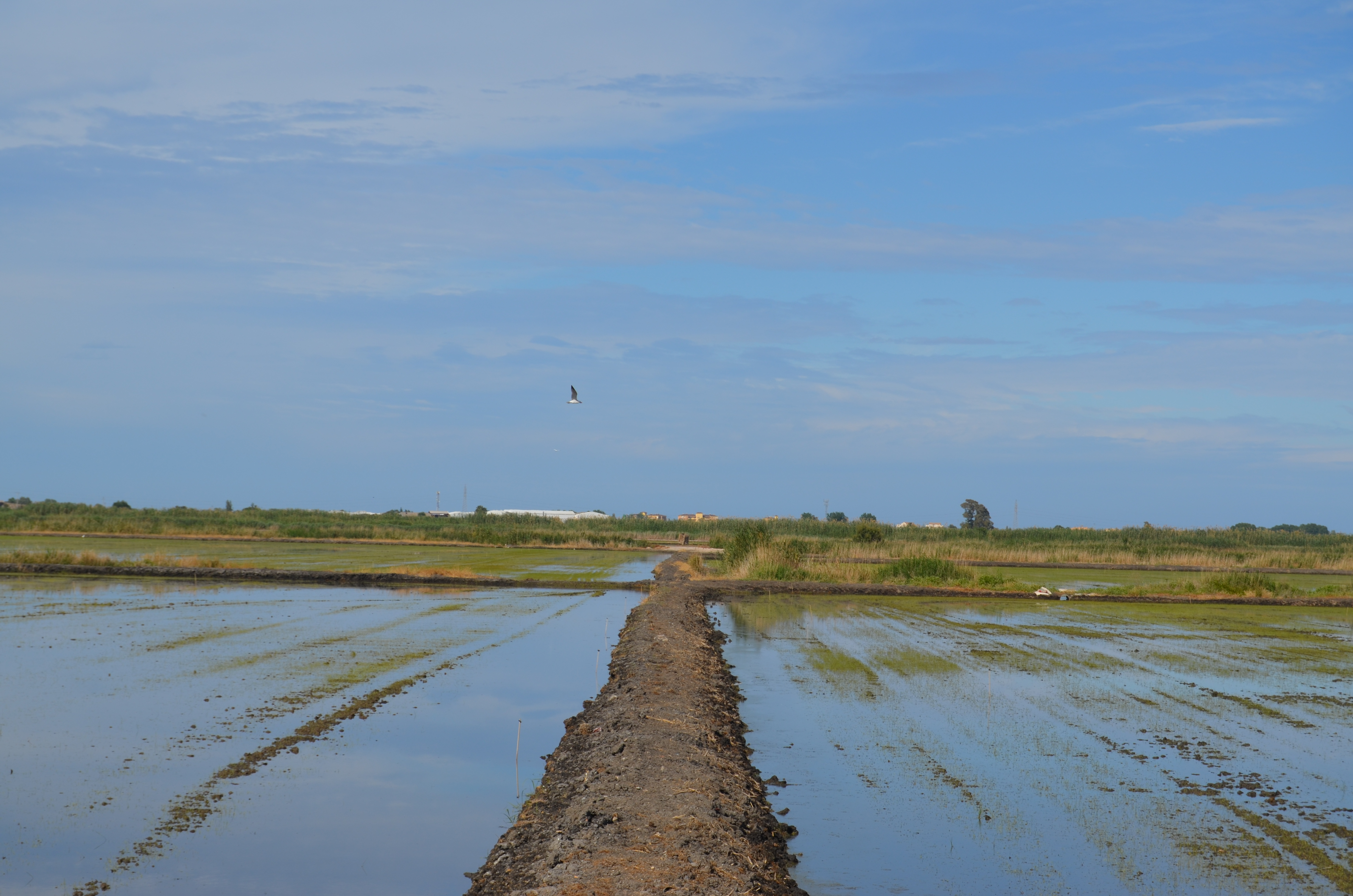 Parque natural del Marjal de Pego-Oliva This is a photography of a Special Area of Conservation in Spain with the ID: ES0000147. Natura2000 entry, EEA entry